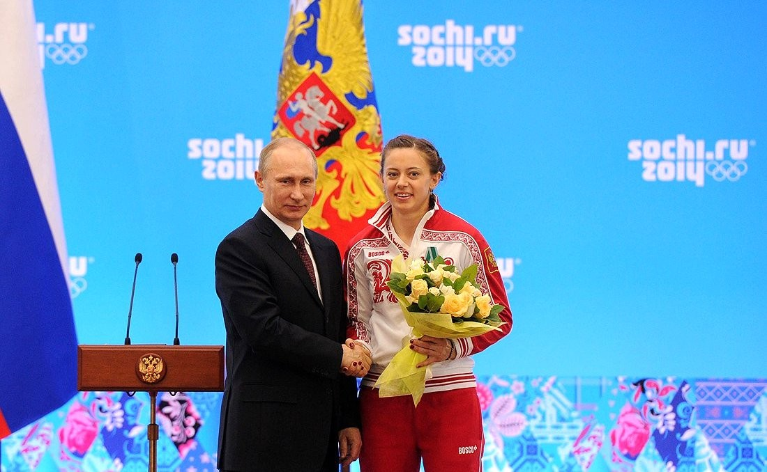 Орденом Дружбы награждена двукратный серебряный призёр Олимпийских игр в биатлоне Ольга Вилухина.